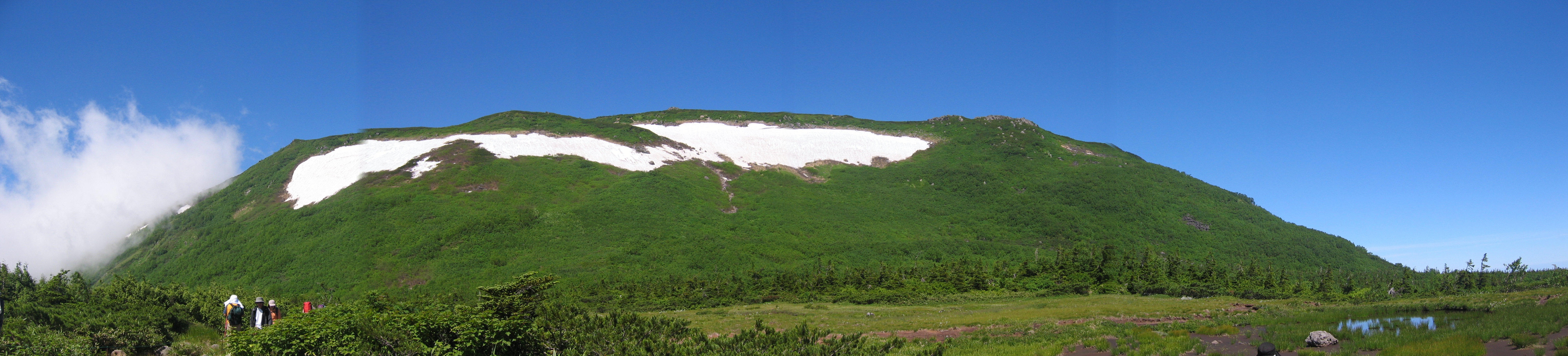 2006年8月4日、利用者自身の撮影、合成。